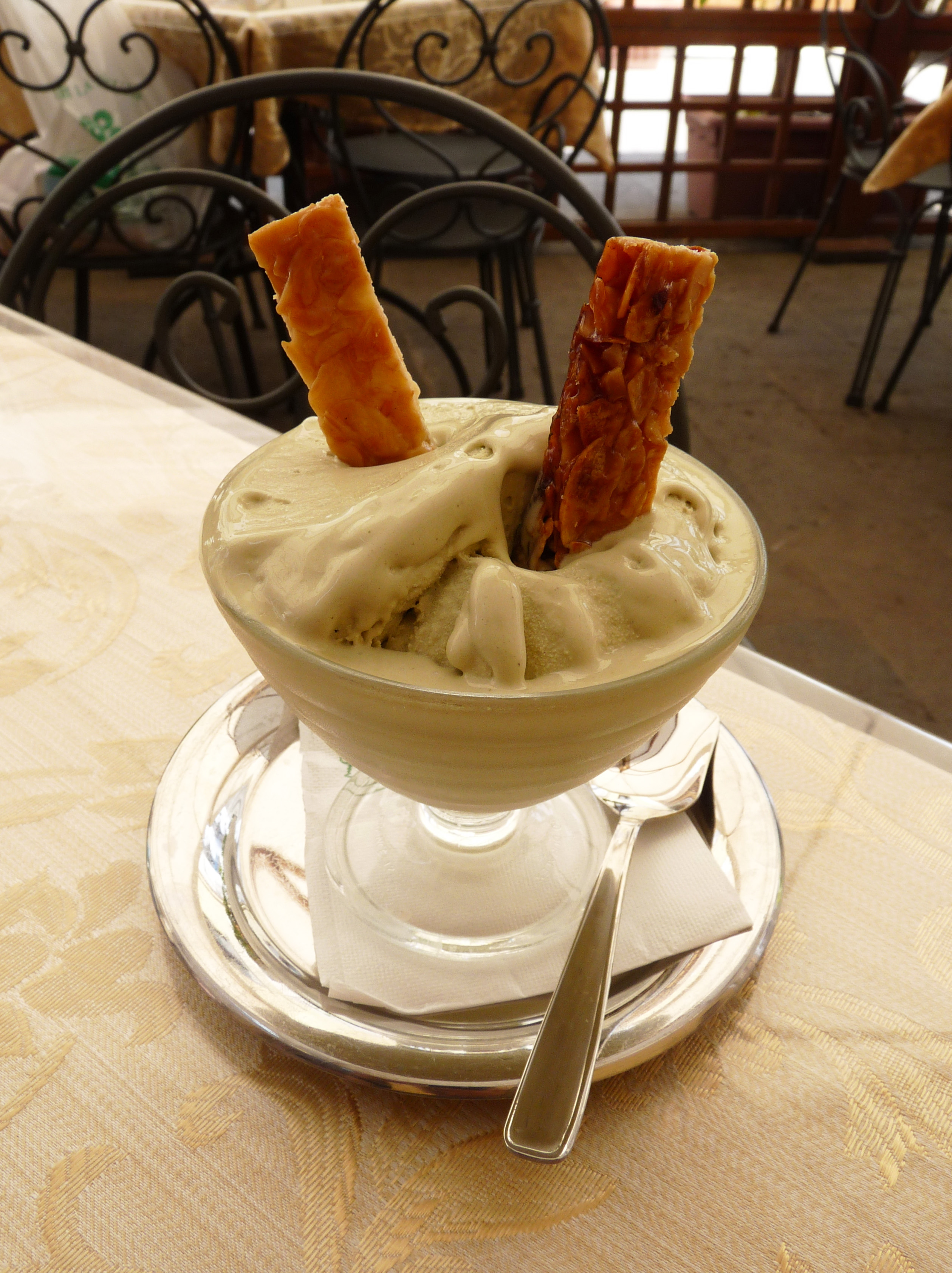 Glace à la pistache à Lipari (îles Eoliennes, Sicile)